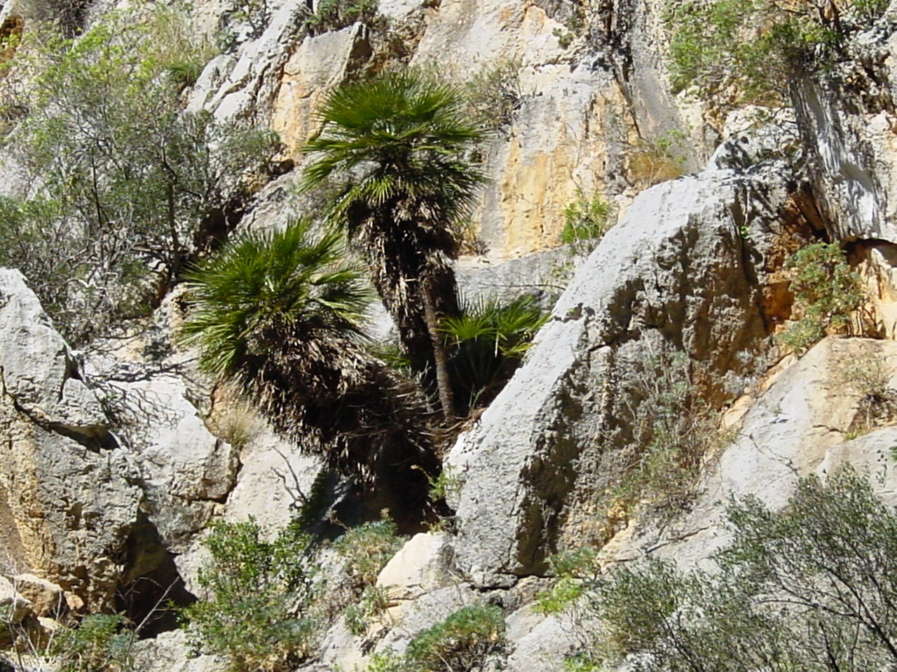 Riserva naturale Monte Pellegrino Palermo, Sicily